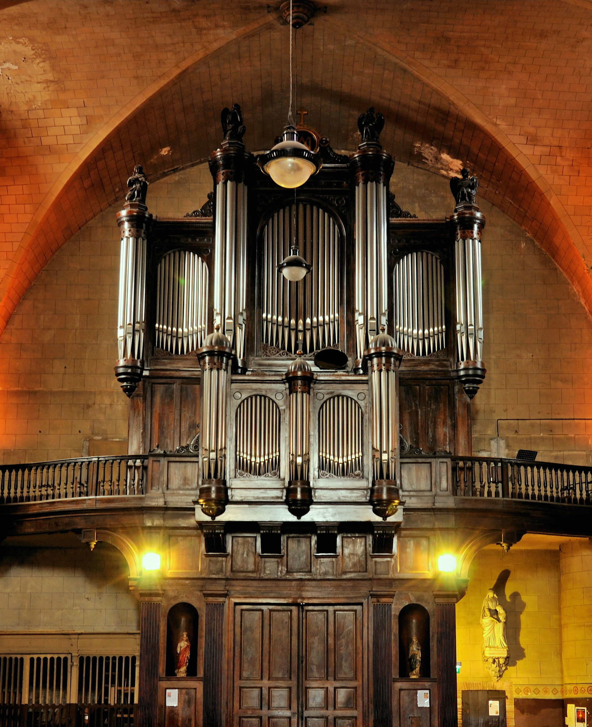 Grand-Orgue de Notre-Dame du Camp (Pamiers - Ariège), construit en 1860 par Emile Poirier et Nicolas Lieberknecht.